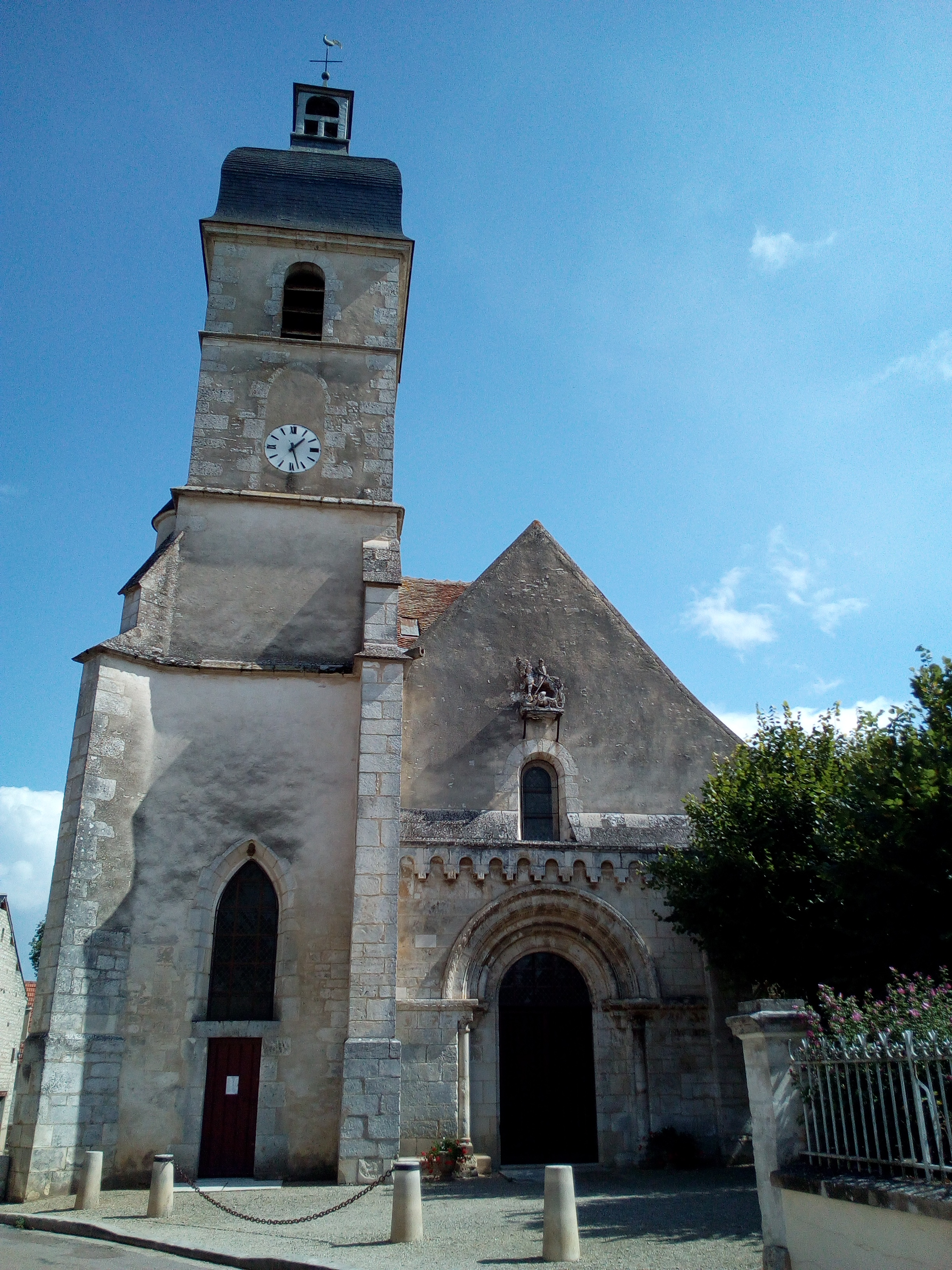 Ancienne Eglise Saint-Georges du XIIe s.